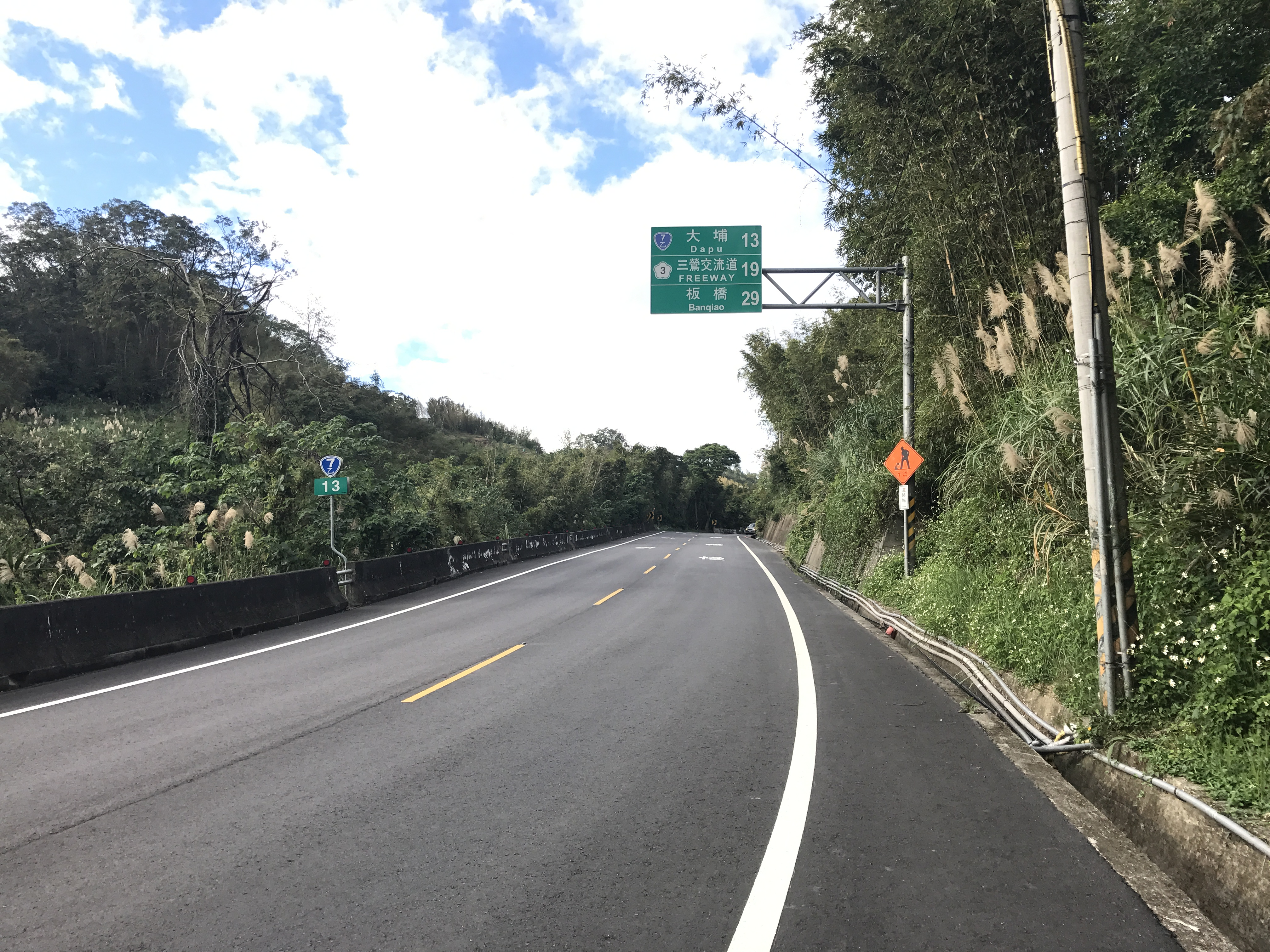 中文（台灣）: 台7乙線三民里路段